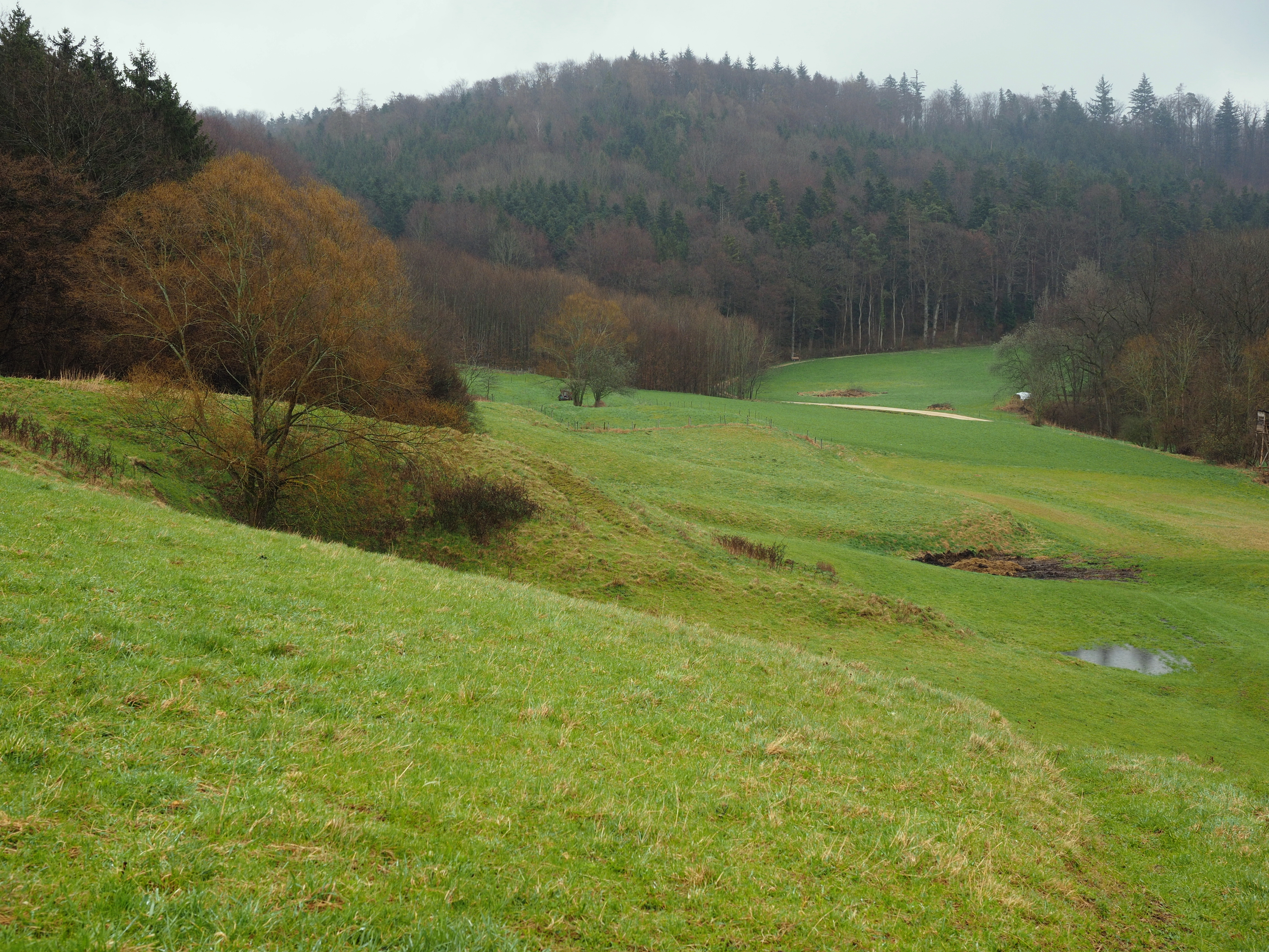 Unteres Ende der Bergrutschung Tannenwald, Waldstetten, mit aufgefaltetem Gelände. Der Rutschhang ist links.